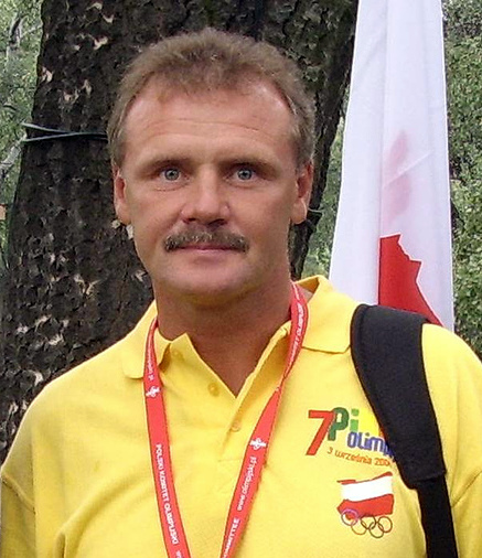 Henryk Petrich